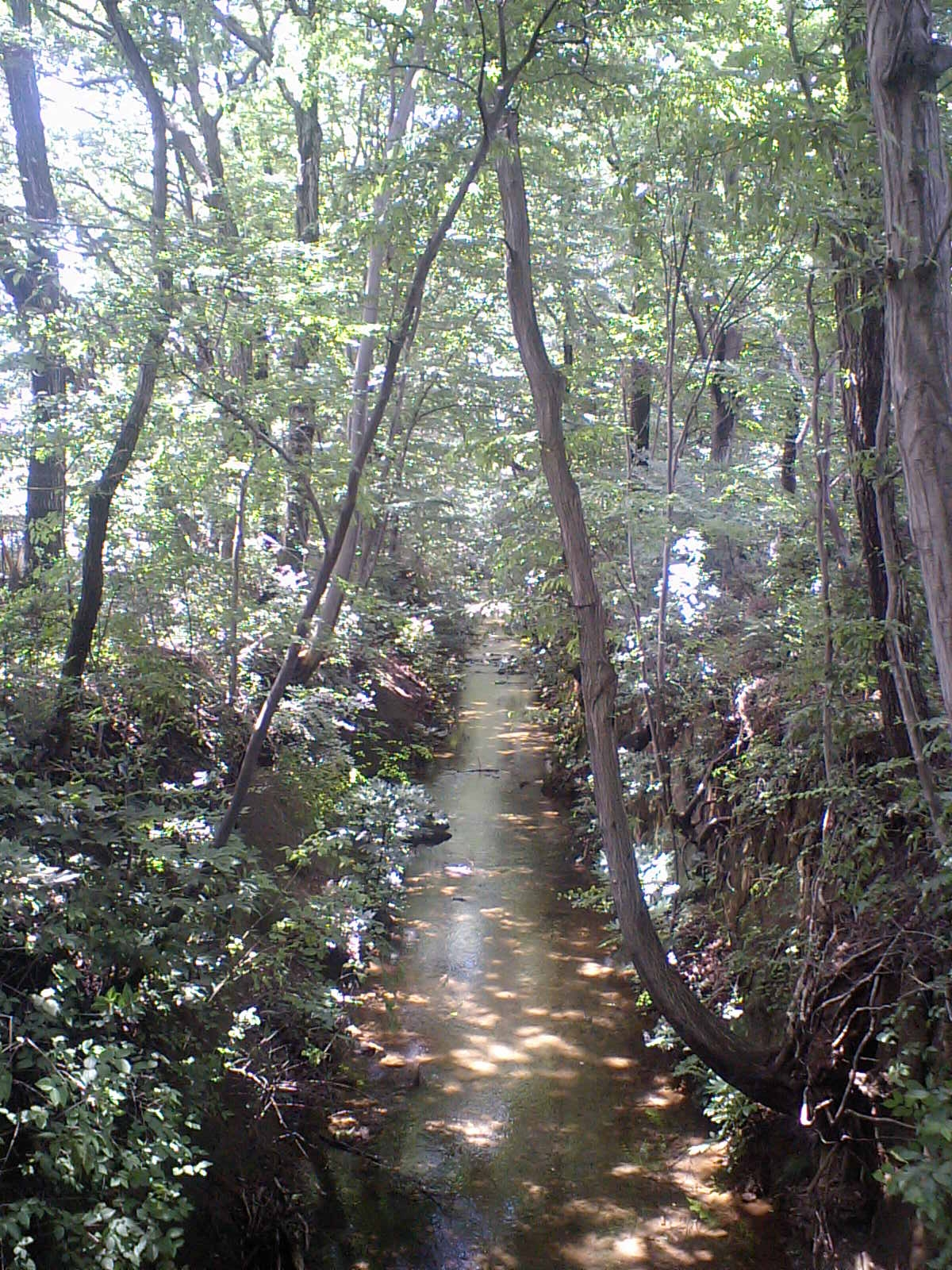 2009年7月25日 立川市幸町周辺 西中島橋から 撮影：tomo-cesare0928 東京都立川市 玉川上水 立川市幸町周辺 西中島橋から